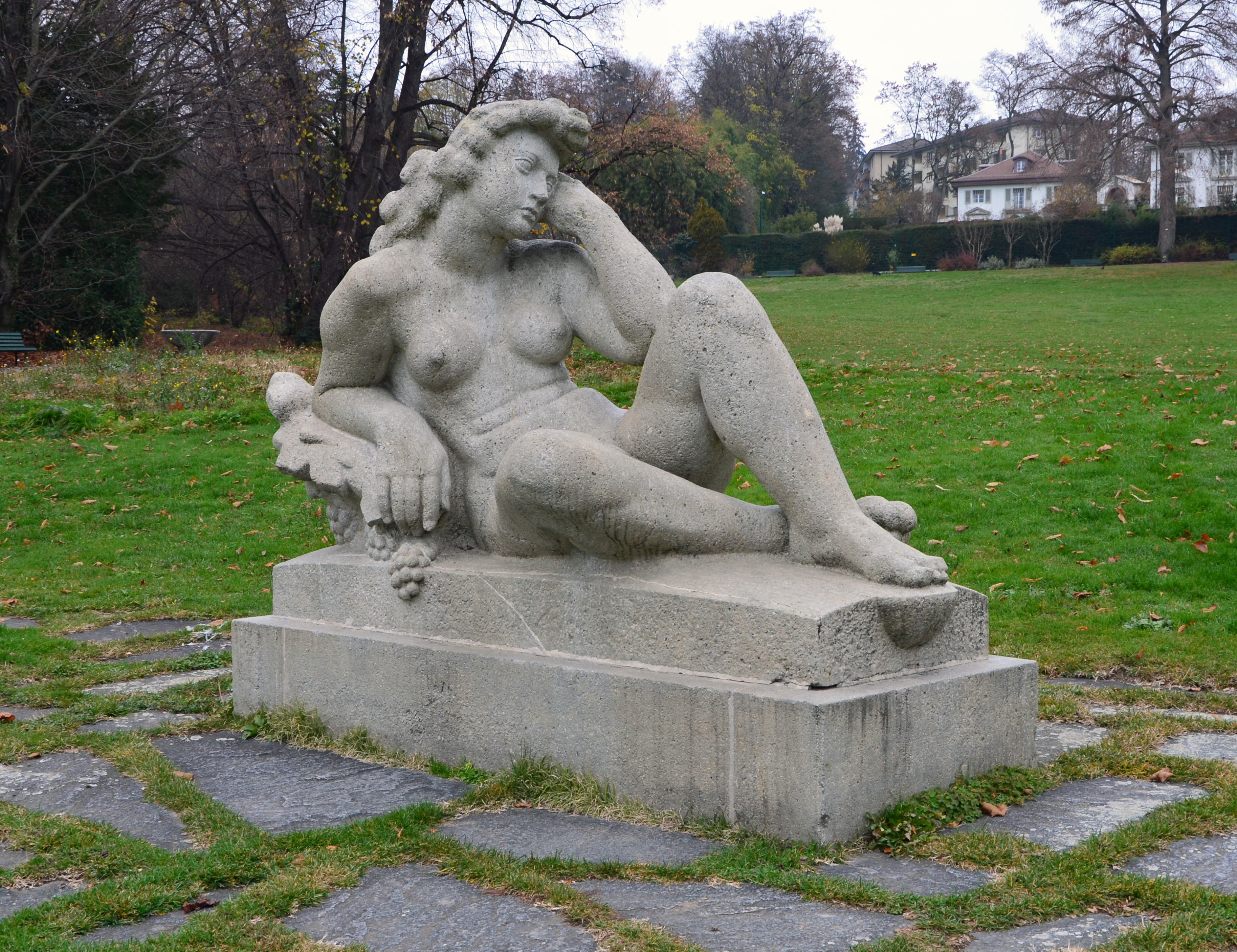 La Vendangeuse oeuvre de l'artiste suisse Casimir Reymond, datant de 1943. Elle se trouve dans le parc du Denantou, à Lausanne (Suisse).